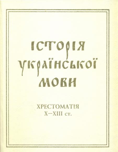 Обкладинка книги: Хрестоматія з історії української мови Х-ХІІІ ст. — Житомир, 2015.